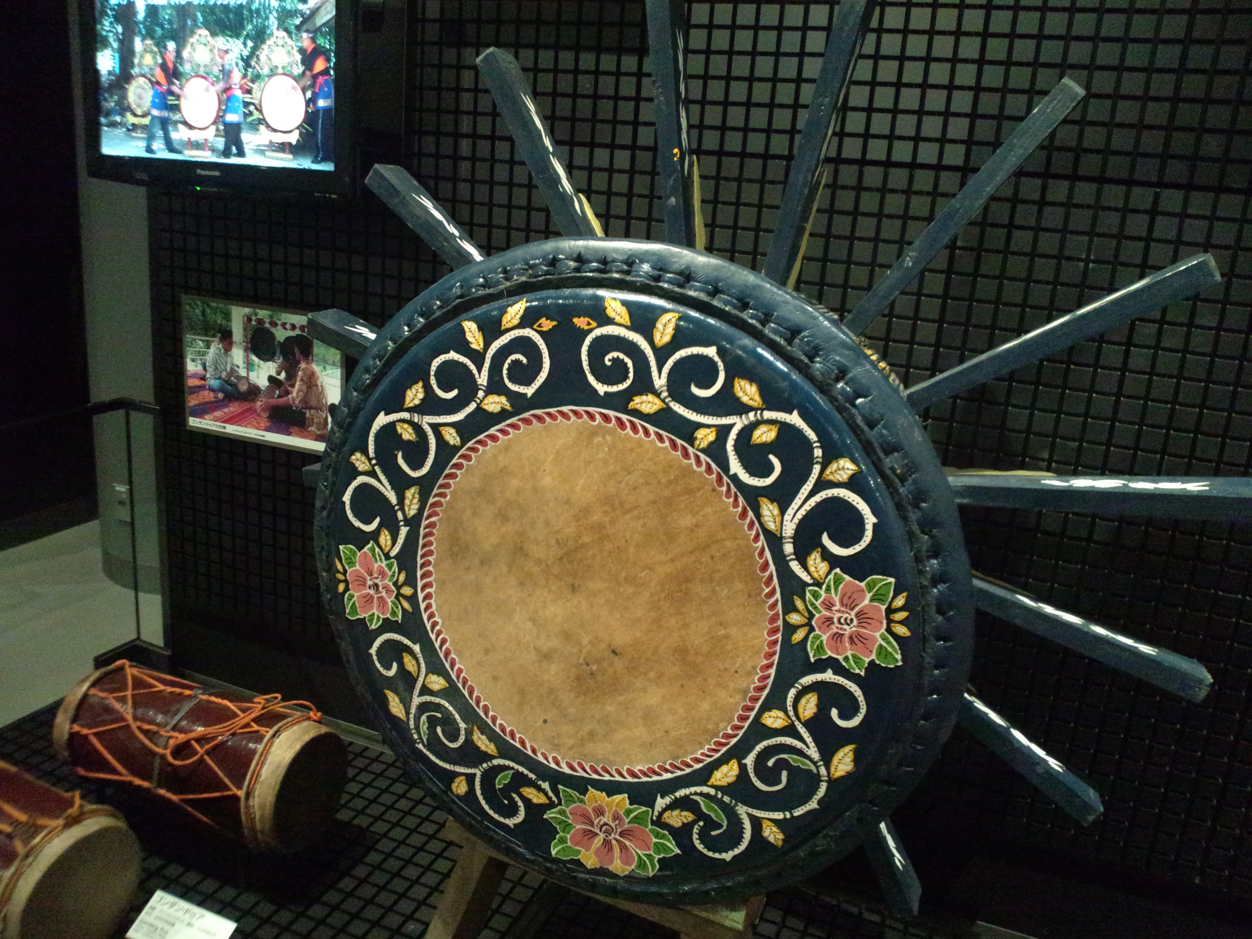 国立民族学博物館（大阪） ルバナ・ウビ（マレーシア、クランタン、2007年収集）